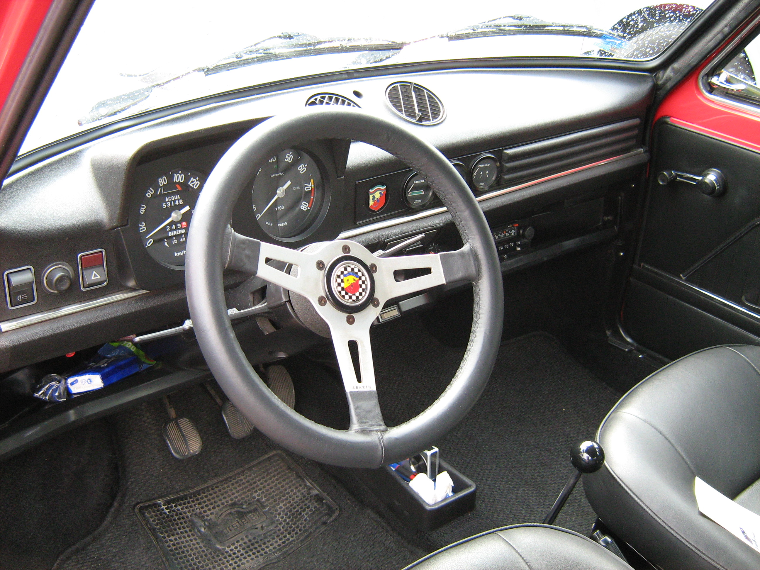 Amatur A 112 Abarth Typ 2